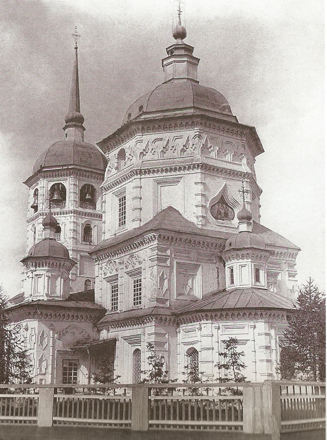 г. Иркутск. Троицкая церковь.